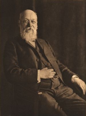 Hermann Diels (1848–1922), deutscher klassischer Philologe